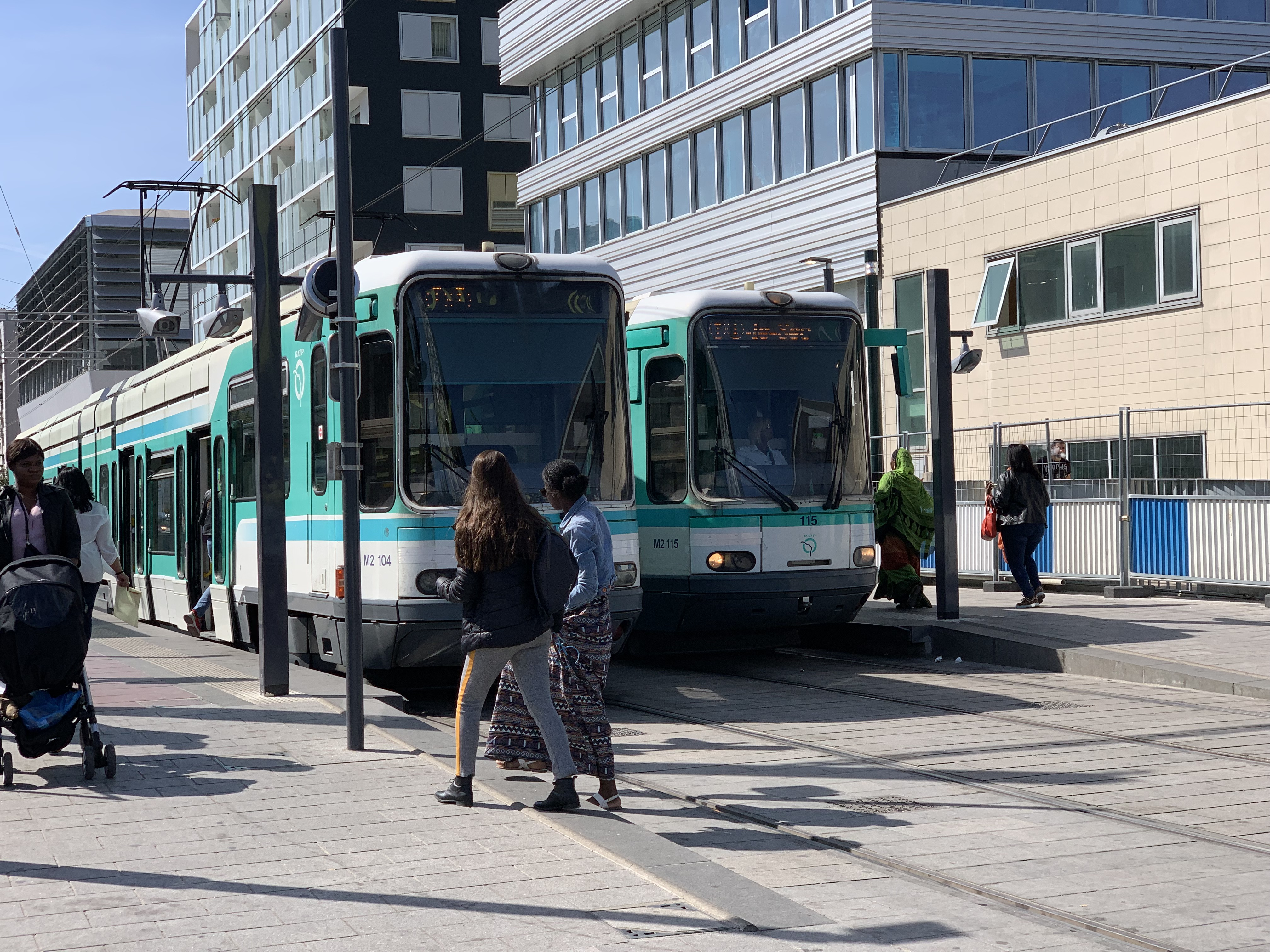 Station Les Courtilles sur la ligne 1 du tramway d'Île-de-France à Asnières-sur-Seine.